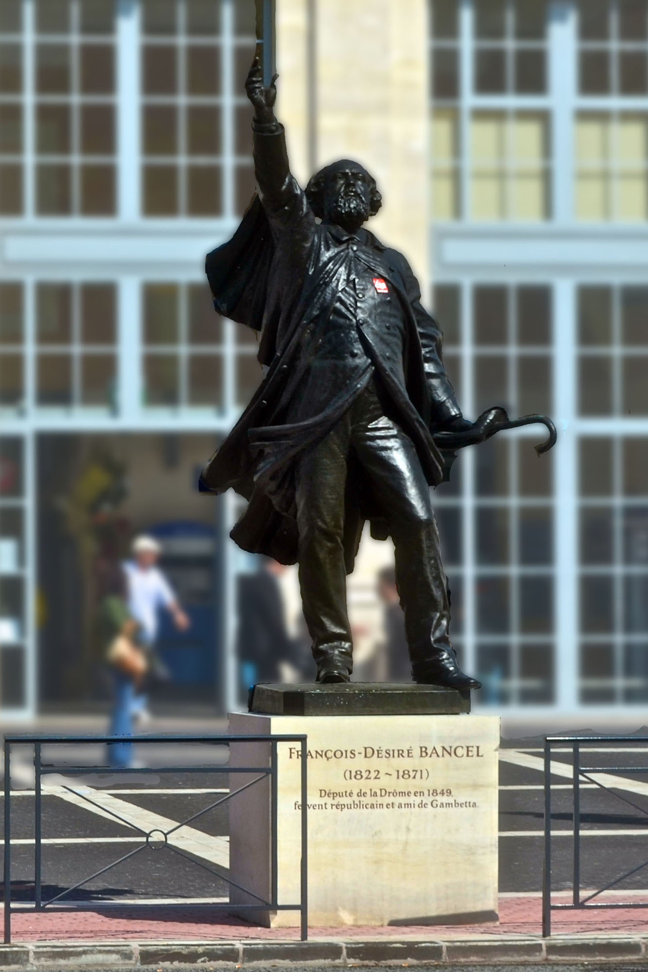 Statue de François-Désiré Bancel (1897) devant la gare de Valence (Drôme)